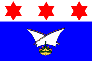 Flag of Qala, Malta